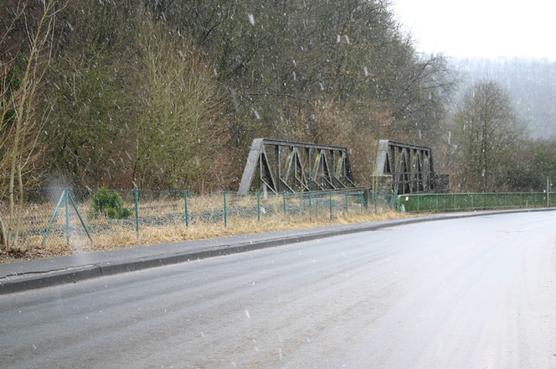 Stahlbrücke kurz vor Prüm über den gleichnamigen Fluss